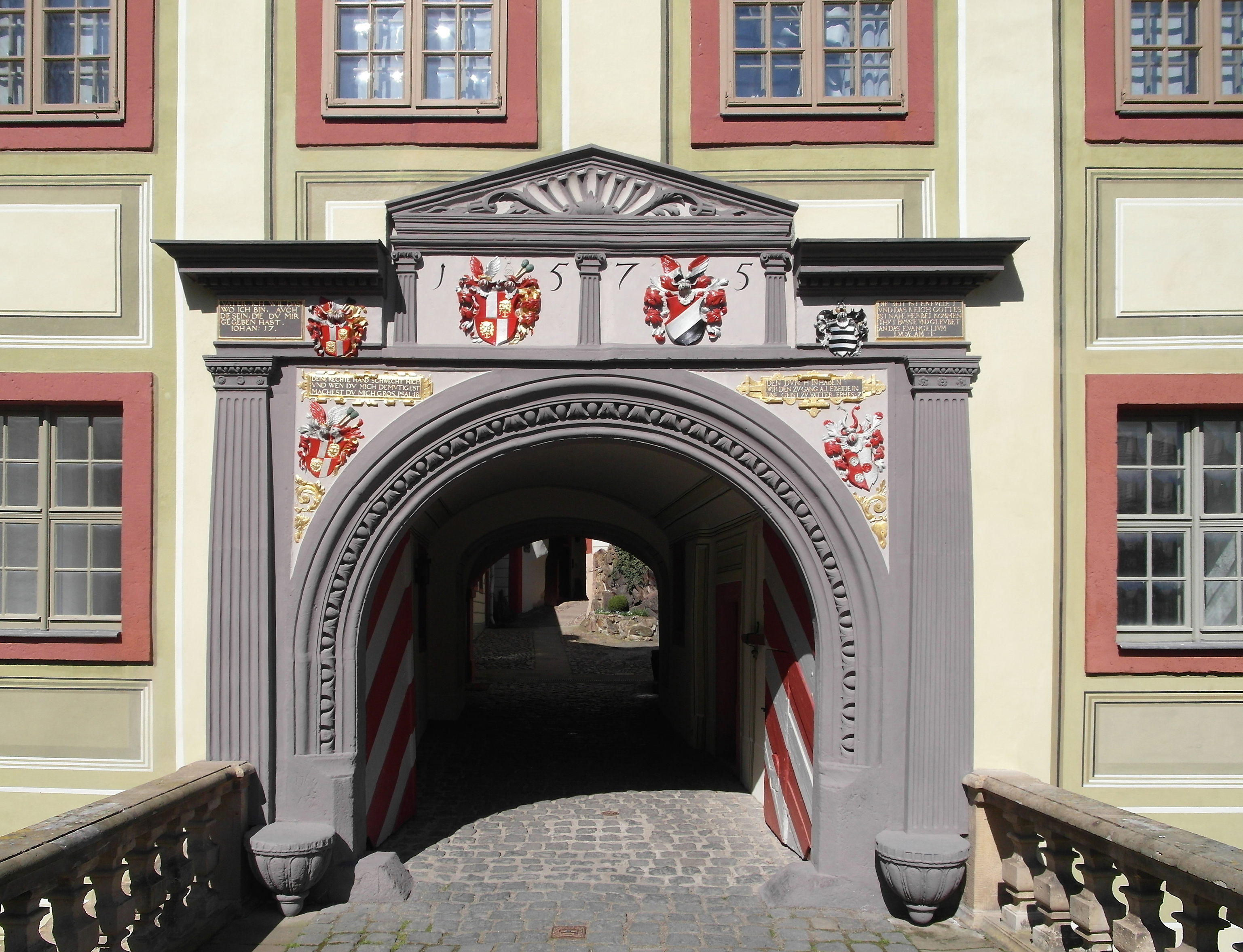 21.04.2016 01809 Weesenstein (Müglitztal) Am Schloßberg 1 (GMP: 50.932966,13.858732): Schloß aus dem 14.-19. Jh. Hauptportal im Stil der Renaissance von 1575 mit 6 Wappen. Im Mittelfeld links steht das Wappen für Rudolph II. von Bünau (1465-1543), im Mittelfeld rechts das der Elisabeth von Starschedel. Links außen befindet sich das Wappen für Heinrich von Bünau d. Ä. (1504 - 1570). Außen rechts steht das Wappen für seine Frau Margarethe von Miltitz. Im linken Bogenzwickel steht das Wappen von Rudolph III. von Bünau (1547 - 1626), im rechten Zwickel das Wappen für Christiane von Schleinitz. [SAM4597.JPG]20160421105DR.JPG(c)Blobelt